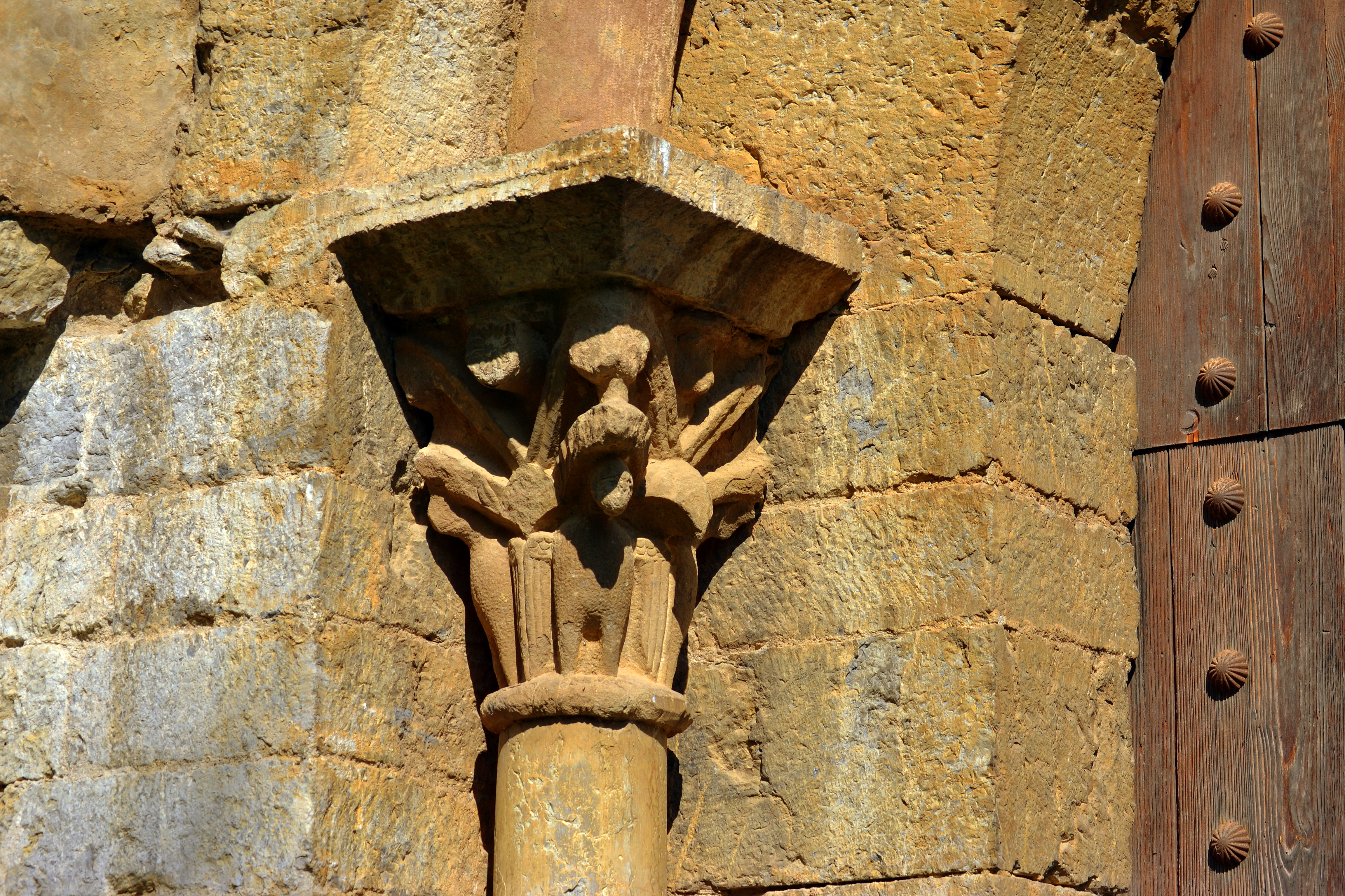 Monestir de Sant Pere (Camprodon)